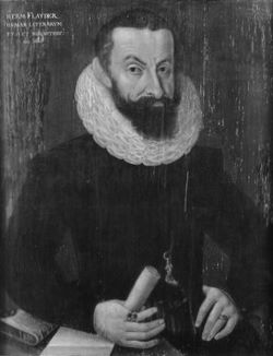 Bild in der Professorengalerie Tübingen